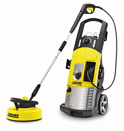 Kärcher Hochdruckreiniger K 7.85 mit Flächenreiniger